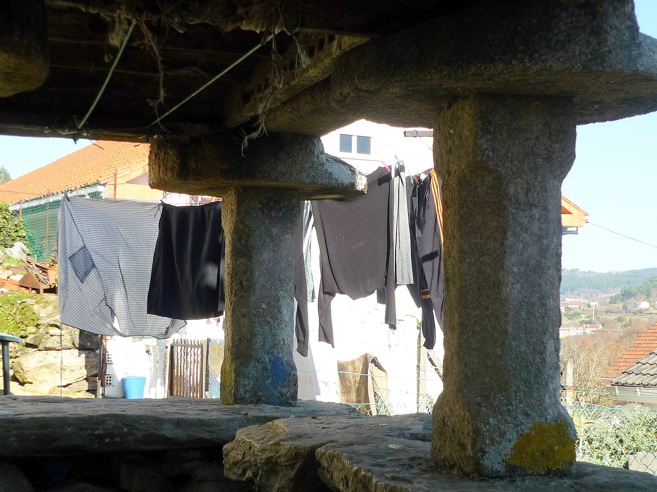 Pés de hórreo en Noia